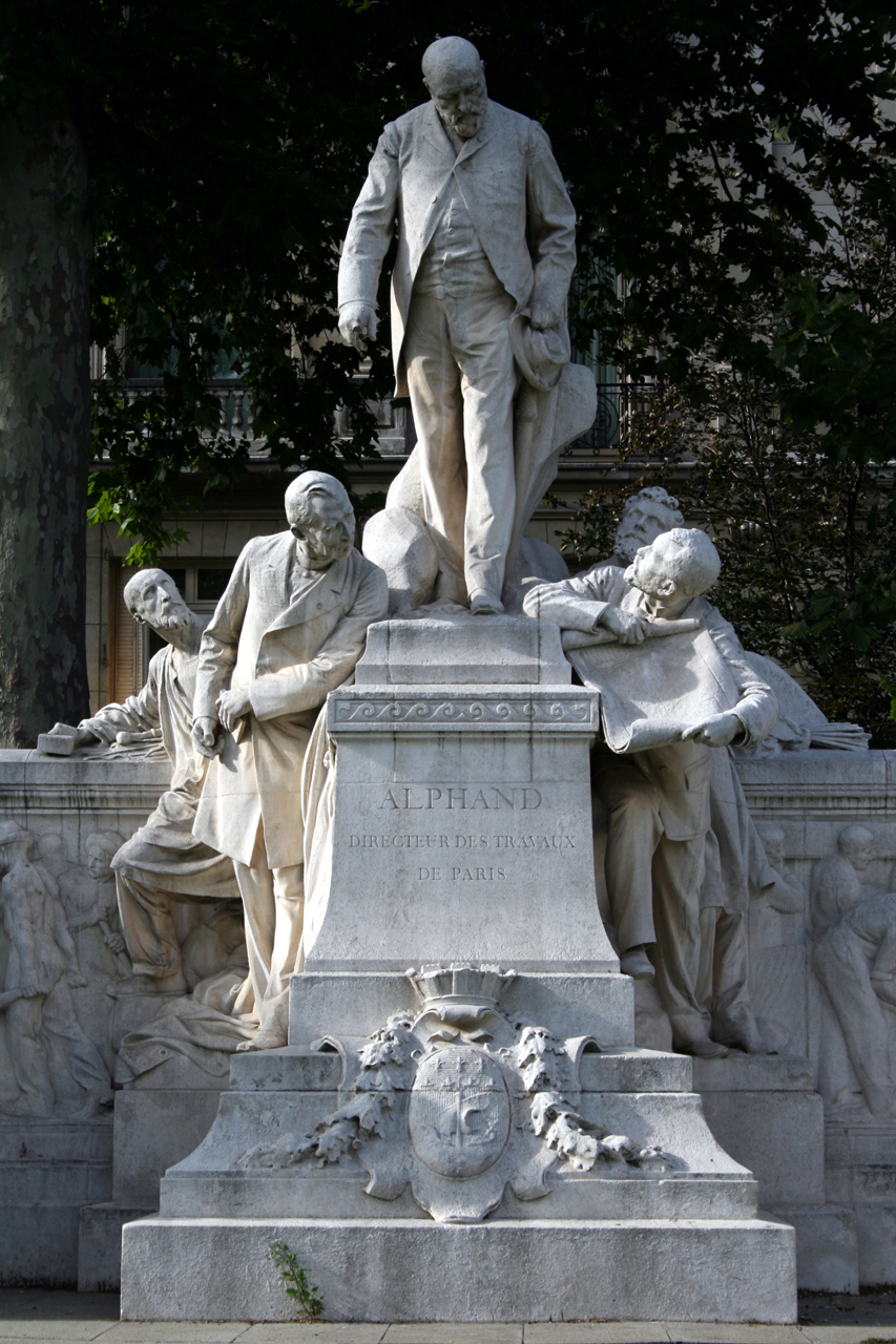 Détail du Monument à Alphand par Jules Dalou (1899), avenue Foch à Paris.